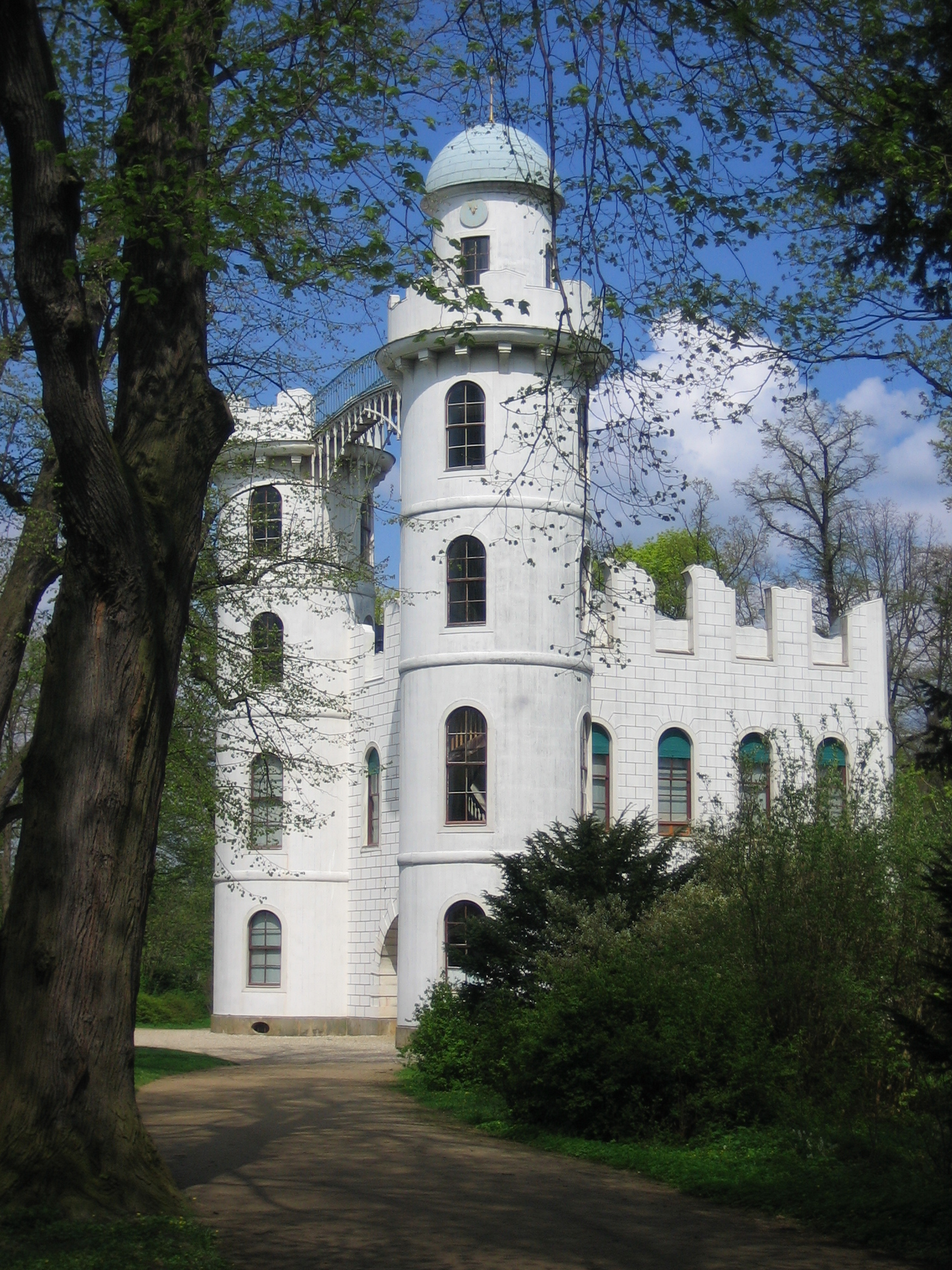 Schloss auf der Pfaueninsel in Berlin,Ansicht von Süden